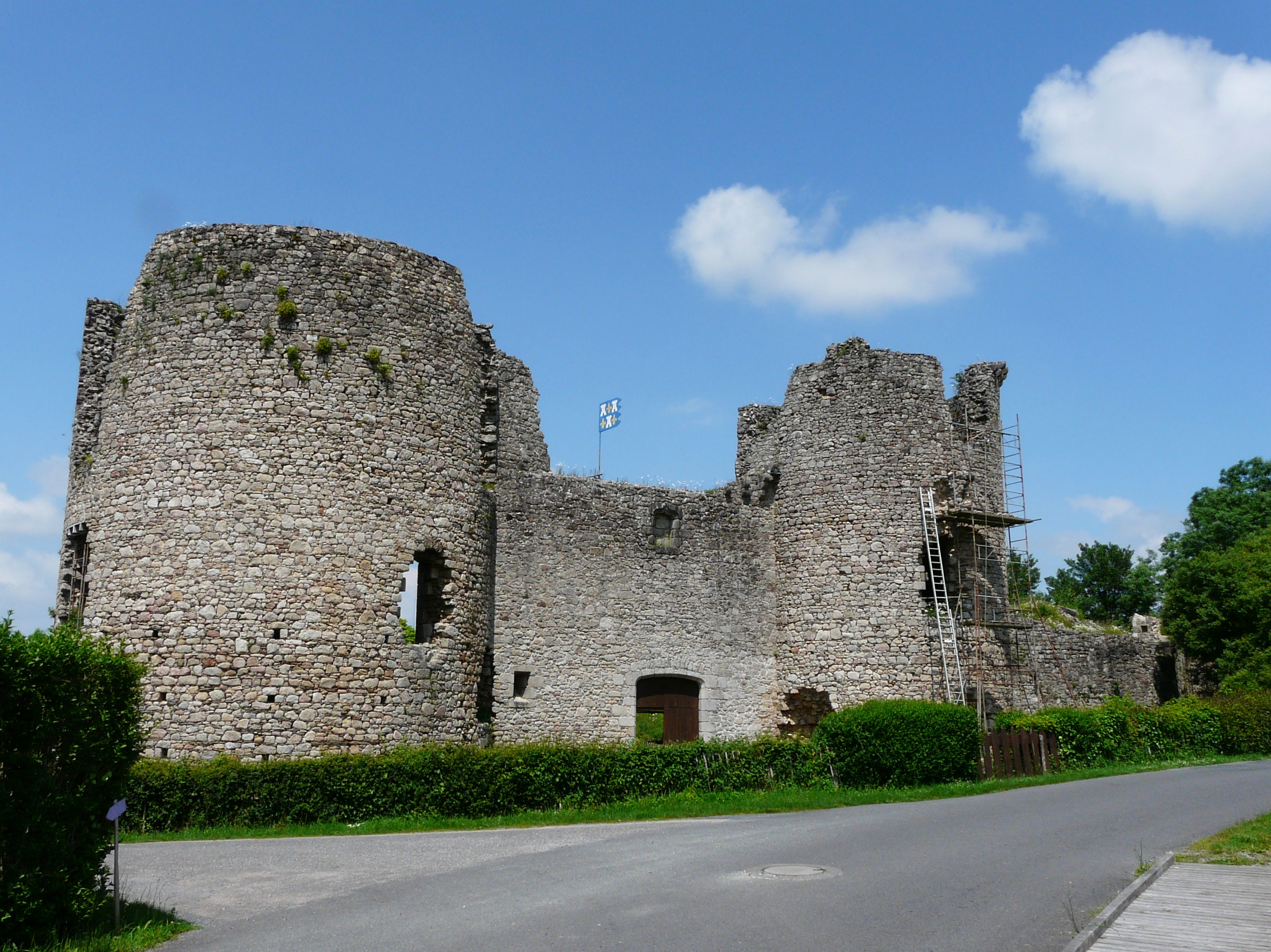 Les ruines du château de Lastours, Rilhac-Lastours, Haute-Vienne, France.